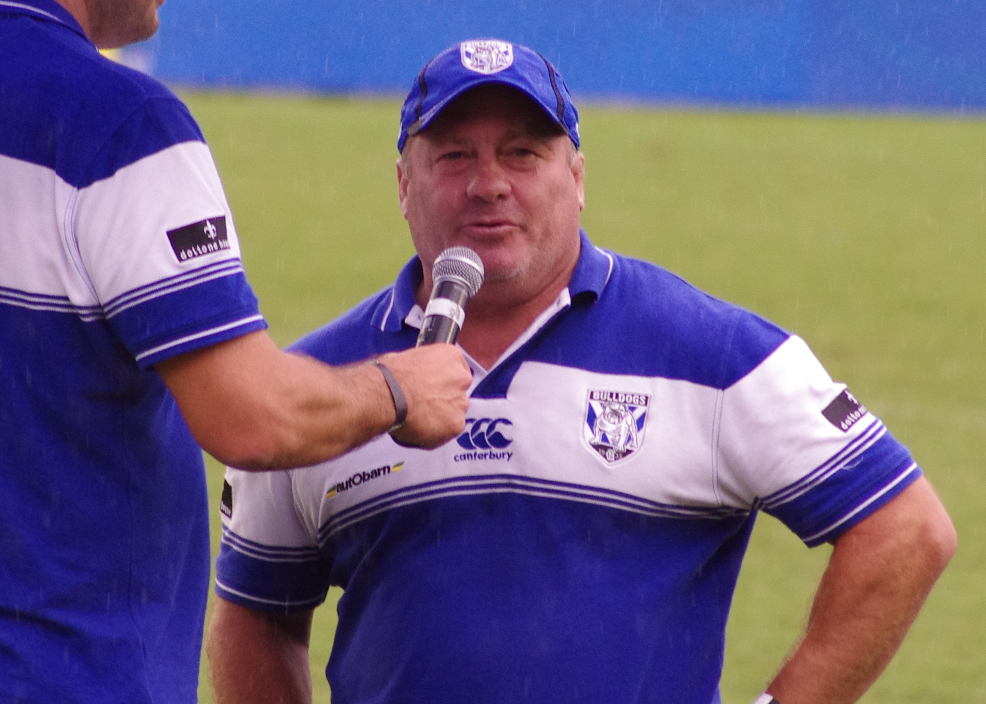 Terry lamb